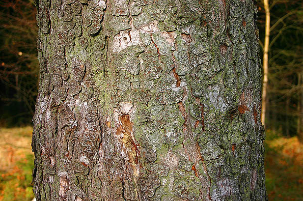 Borke einer 80-jährigen Weißtanne (Abies alba) bei Suhl/Thüringer Wald. Aufnahmegerät: Canon EOS 300d